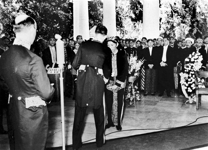 Repronegatief. Op de inhuldiging van de regent van Surabaya, Raden Tumenggung Musono, neemt de regent na de installatie-rede van de gouverneur te hebben beantwoord, de felicitatie's van de bestuursambtanaren in ontvangst